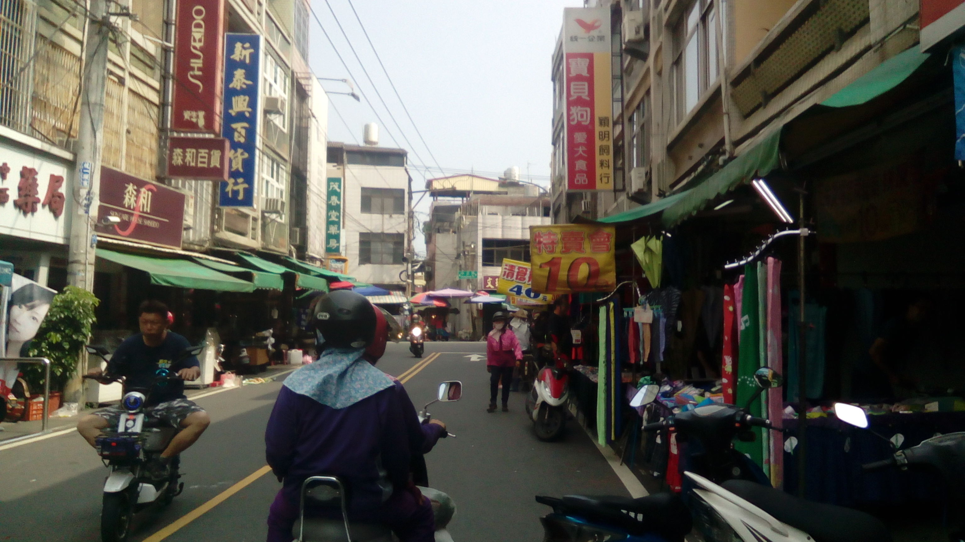 阿蓮區民族路